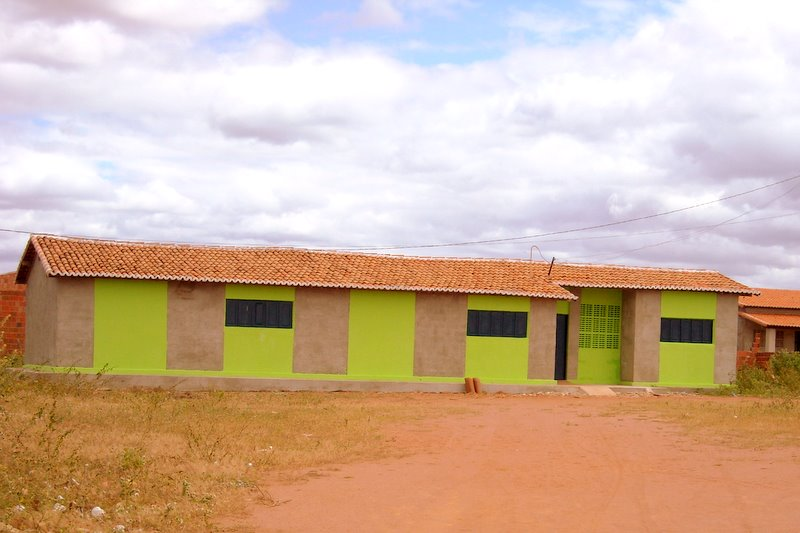 Grupo escolar de ensino fundamental